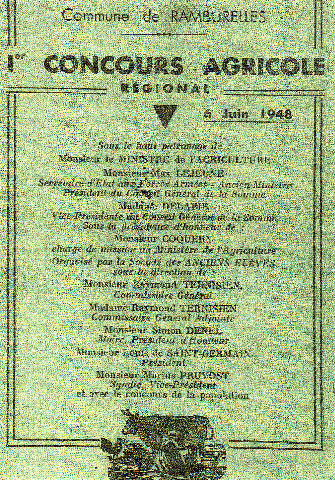 Ramburelles (Somme, France) Première page de la plaquette (petit livret) réalisée pour le Concours agricole de 1948.